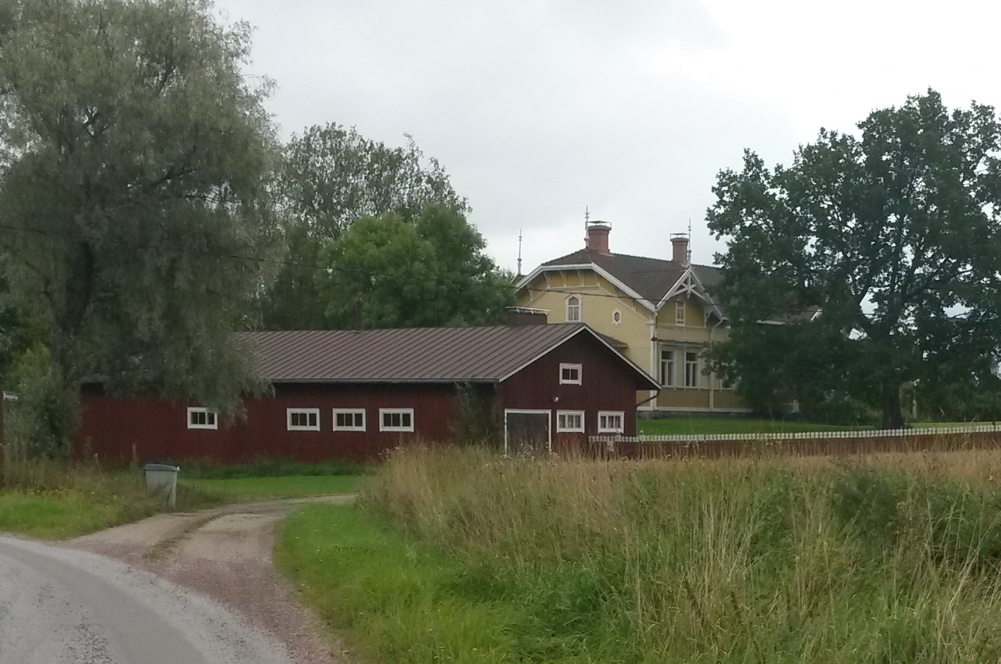 Angelniemen vanha pappila